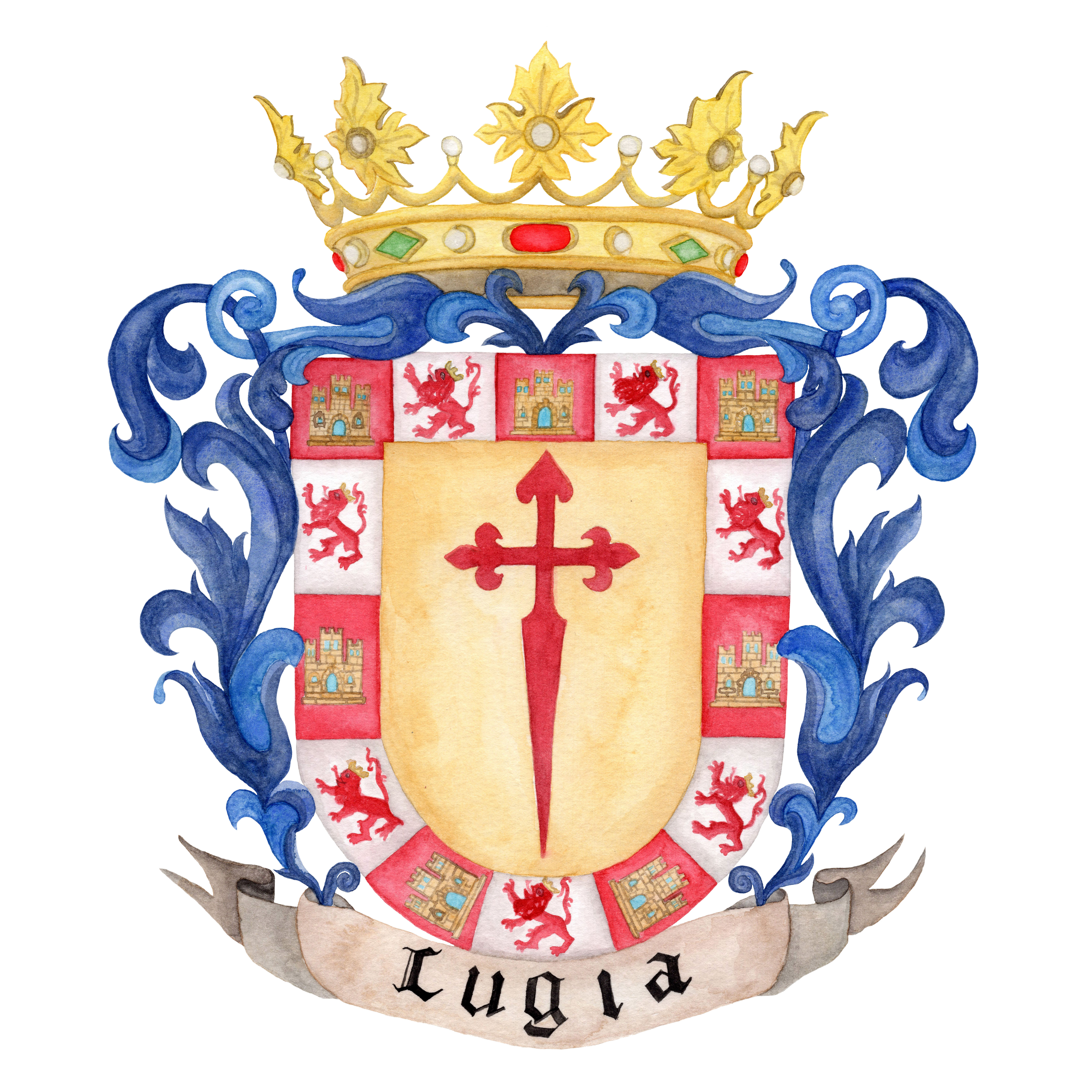 Logotipo de la Asociación Cultural Lugia, Valdepeñas de Jaén.